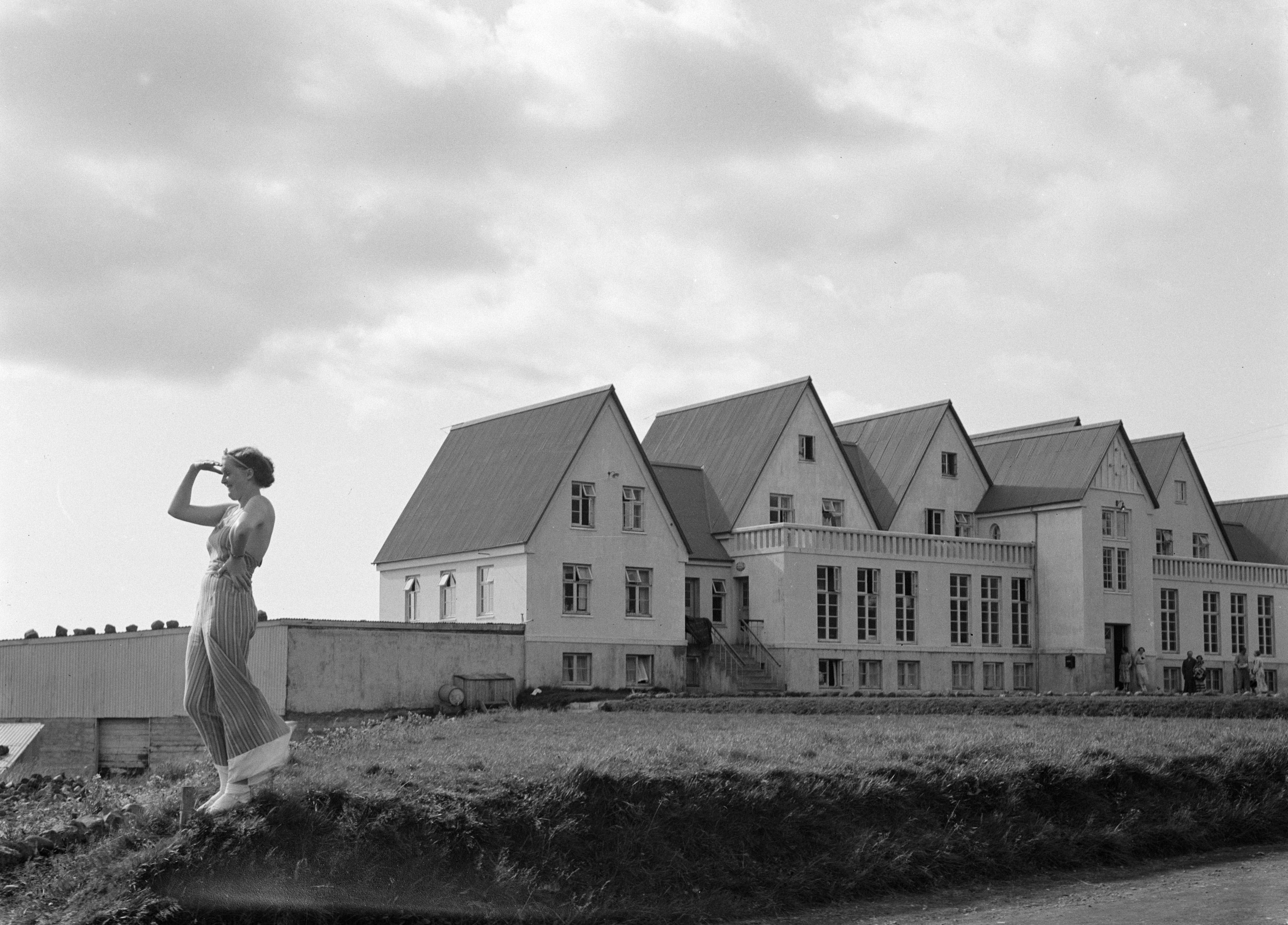 Collectie / Archief : Fotocollectie Van de Poll Reportage / Serie : IJsland Beschrijving : Laugarvatn. Winterschool voor meisjes. De jonge vrouw links is Valgerður Tryggvadóttir (1916–1995) Annotatie : Valgerður Tryggvadóttir is de dochter van Tryggva Thórhallsson, premier van IJsland van 1927–1932 Datum : 1934 Locatie : IJsland, Laugarvatn Trefwoorden : architectuur, meisjes, scholen, vrouwen Fotograaf : Poll, Willem van de Auteursrechthebbende : Nationaal Archief Materiaalsoort : Glasnegatief Nummer archiefinventaris : bekijk toegang 2.24.14.02 Bestanddeelnummer : 190-0361